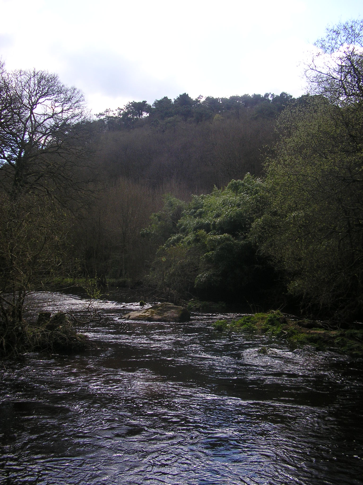 Le scorff (près de la foret de pont-calleck)